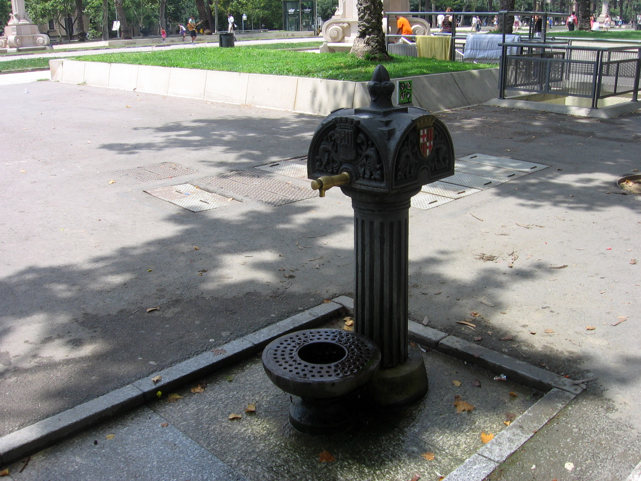 Fuente pública